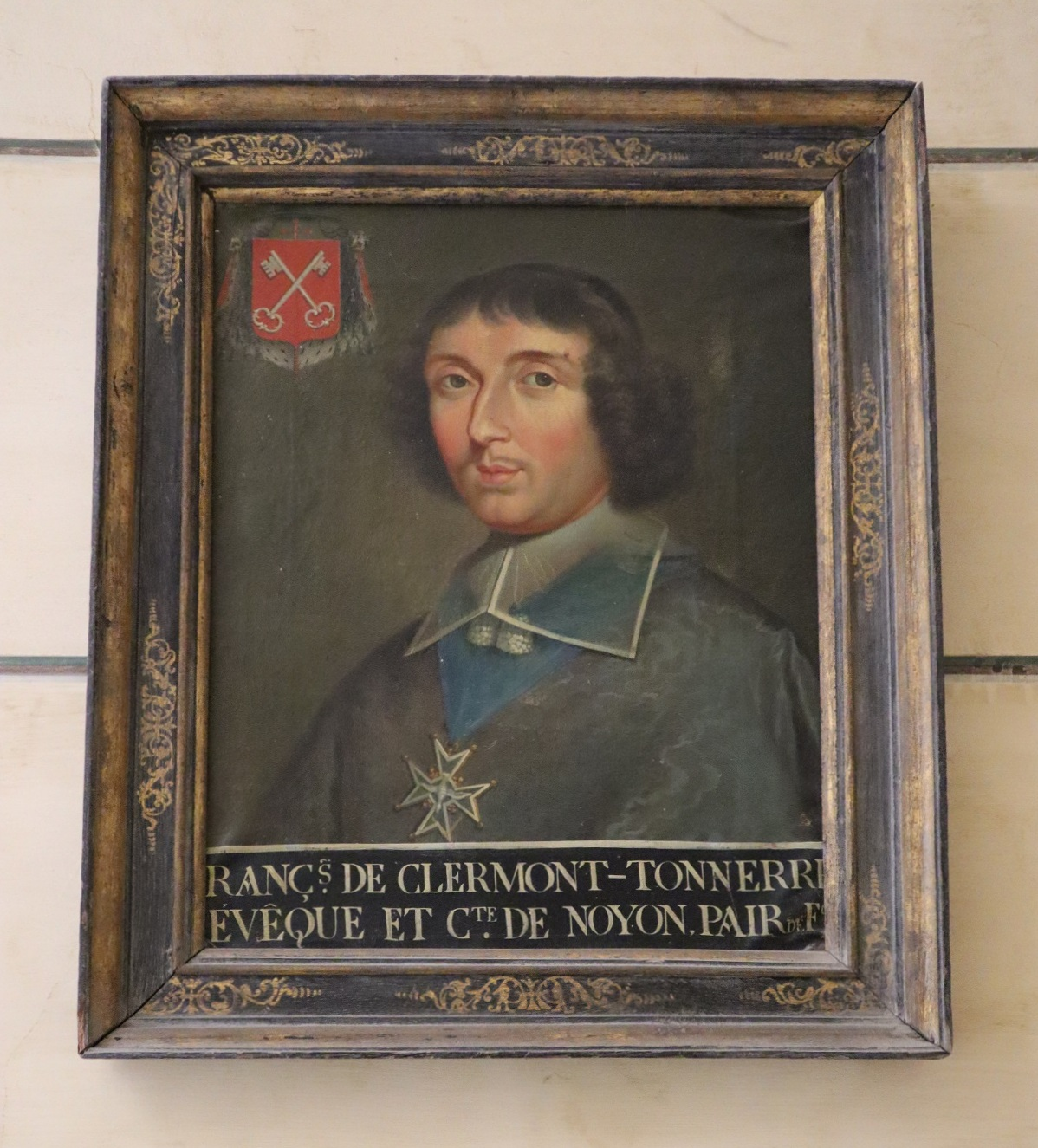 François de Clermont-Tonnerre (1629-1701) Évêque et Comte de Noyon, Pair de France. Tableau du château d'Ancy-le-Franc.